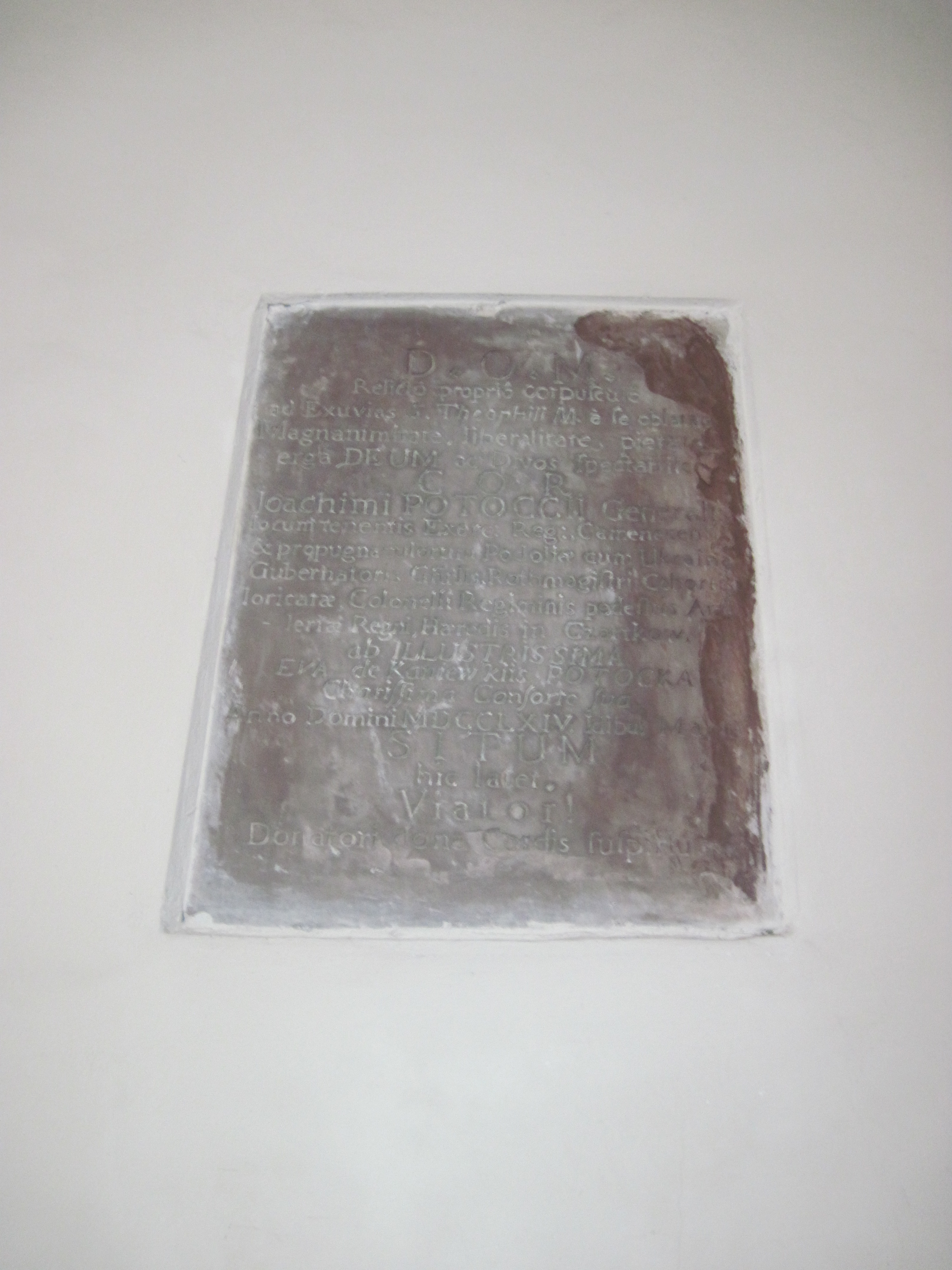 Пам. дошка Йоахима Потоцького, Чортків, костел, осінь 2014